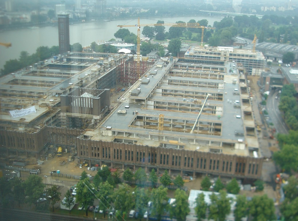 alte Messehallen werden für zukünftige Nutzung von RTL umgebaut